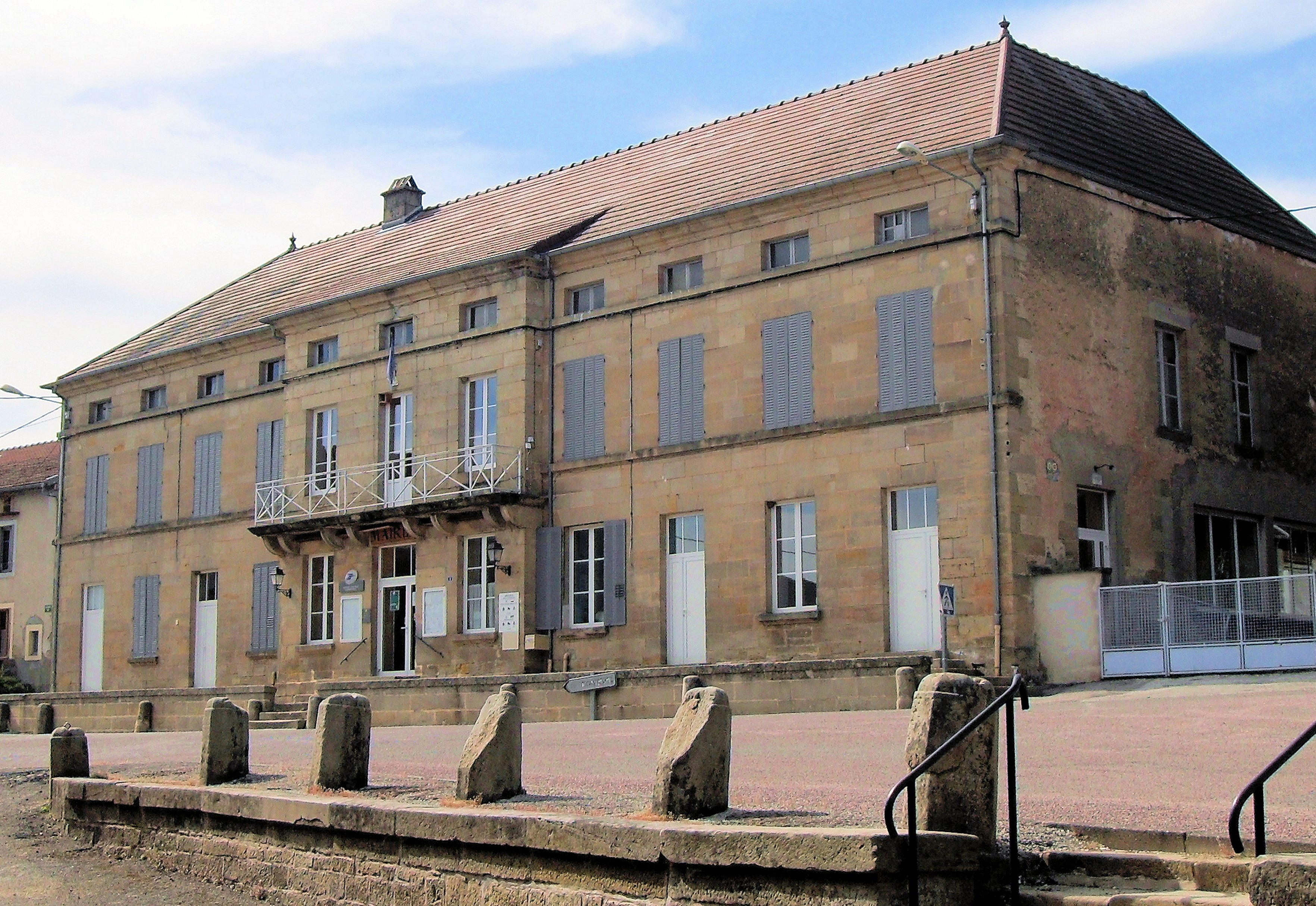 La mairie de Serqueux